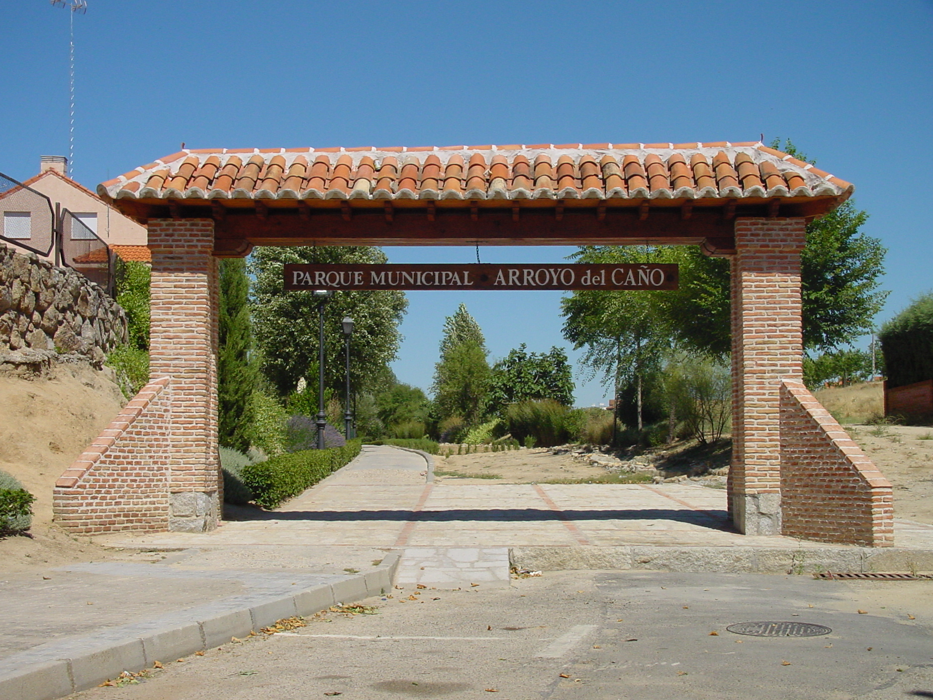 Parque municipal Arroyo del Caño en Moraleja de Enmedio.